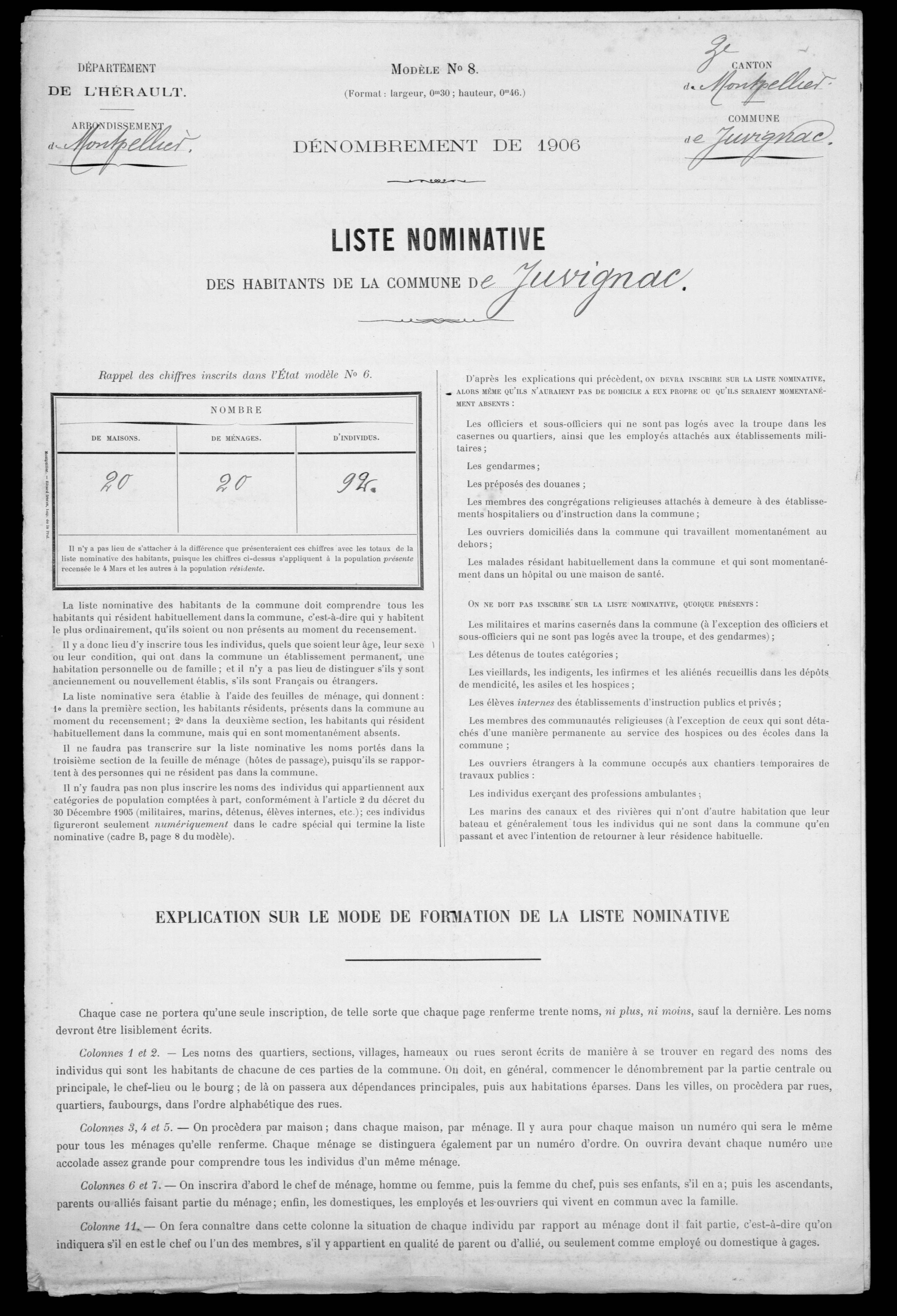 Juvignac : liste nominative de recensement de population